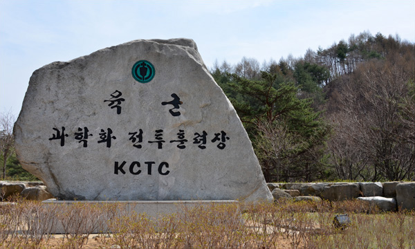 육군 과학화 전투 훈련장